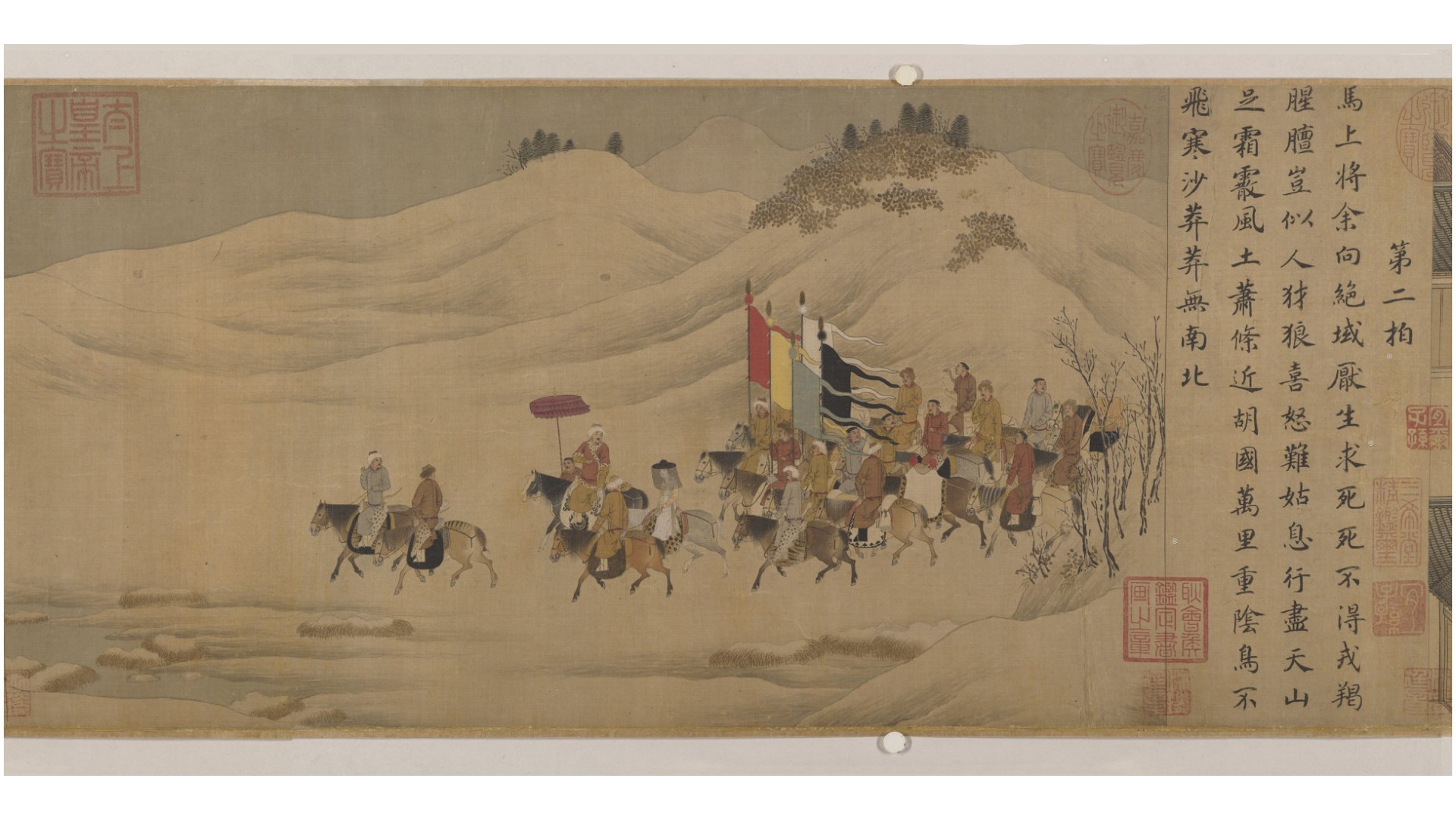 文姬归汉图